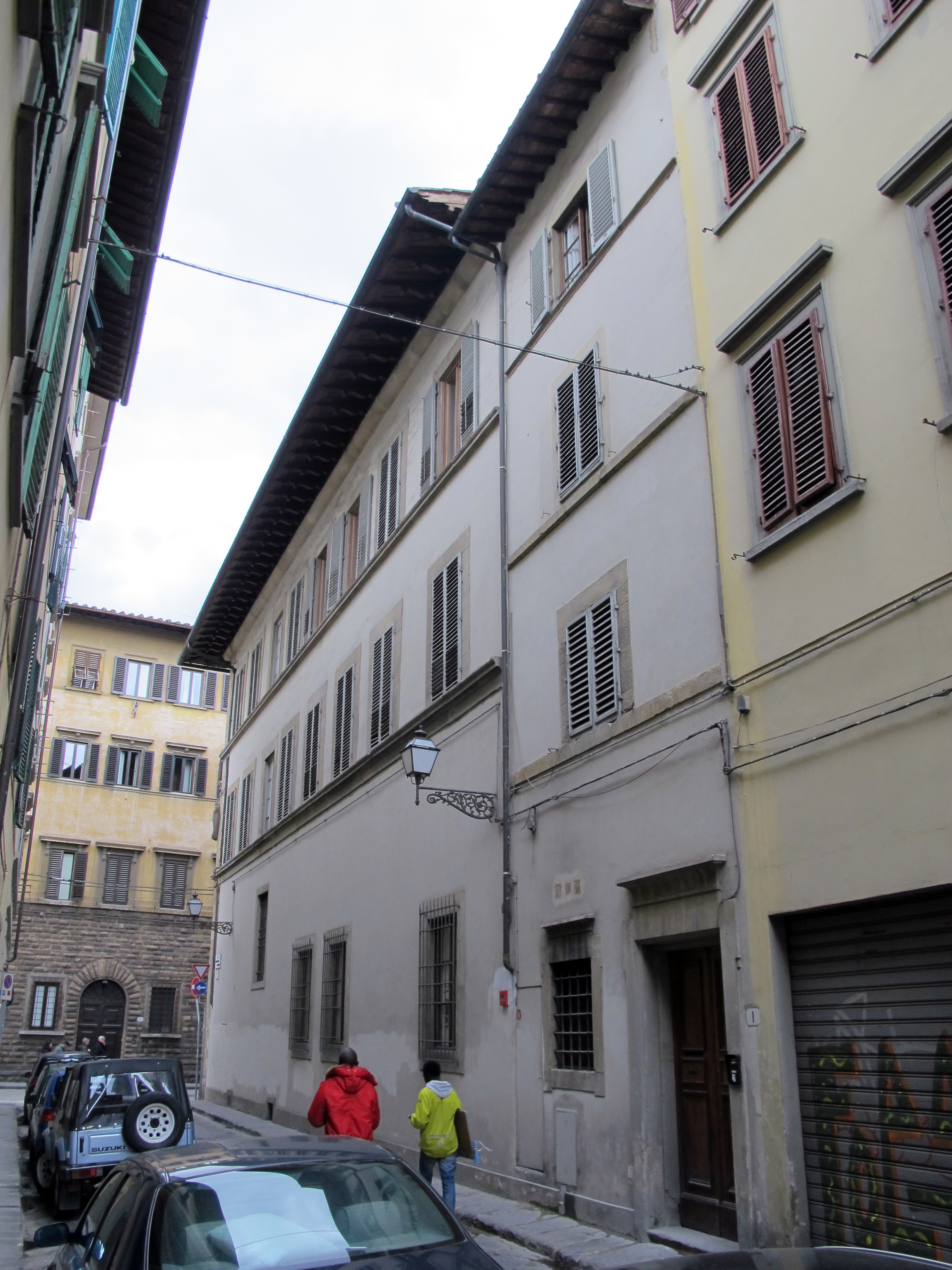 Via michelangelo buonarroti, veduta con casa buonarroti